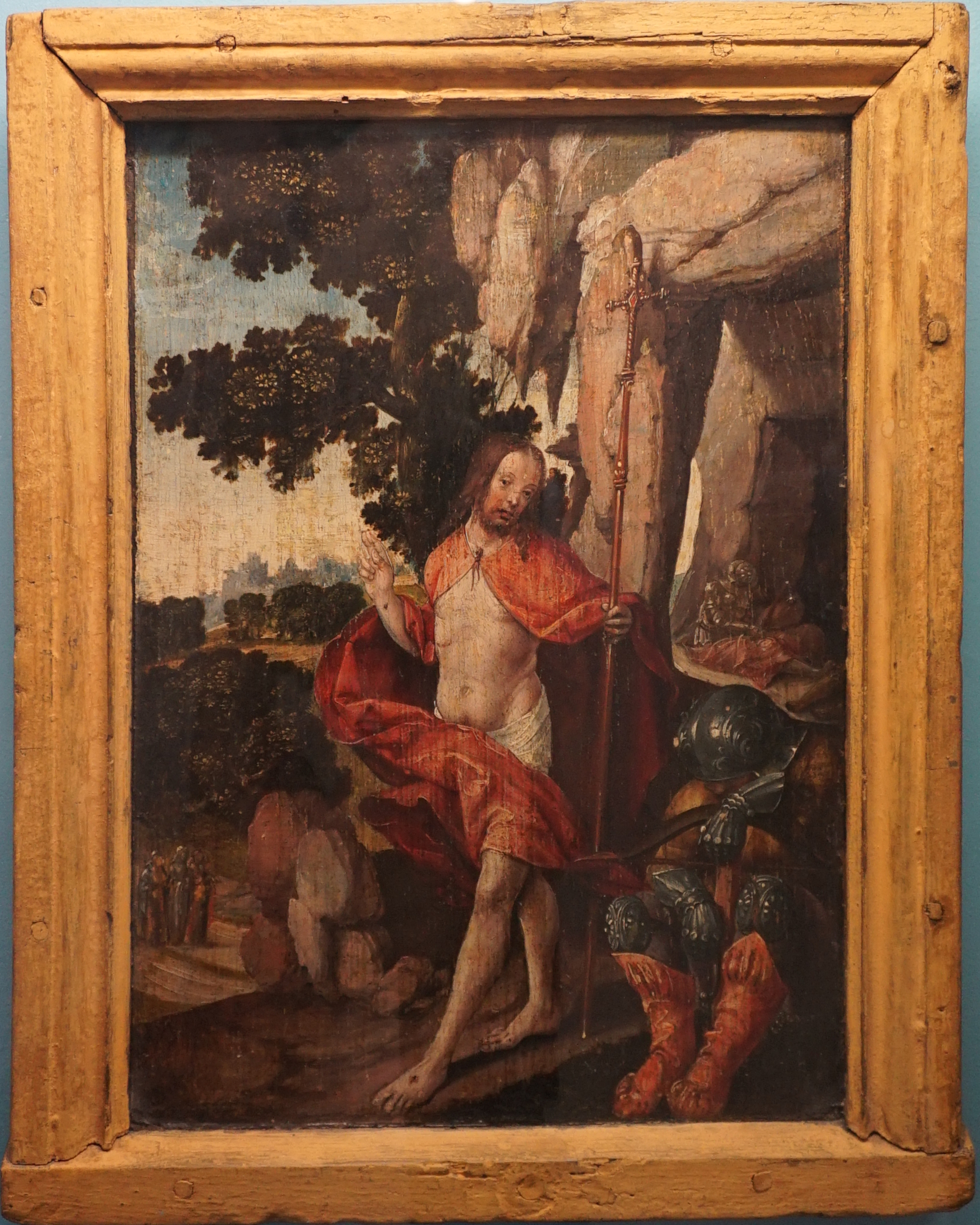 présenté au Musée de Vauluisant.